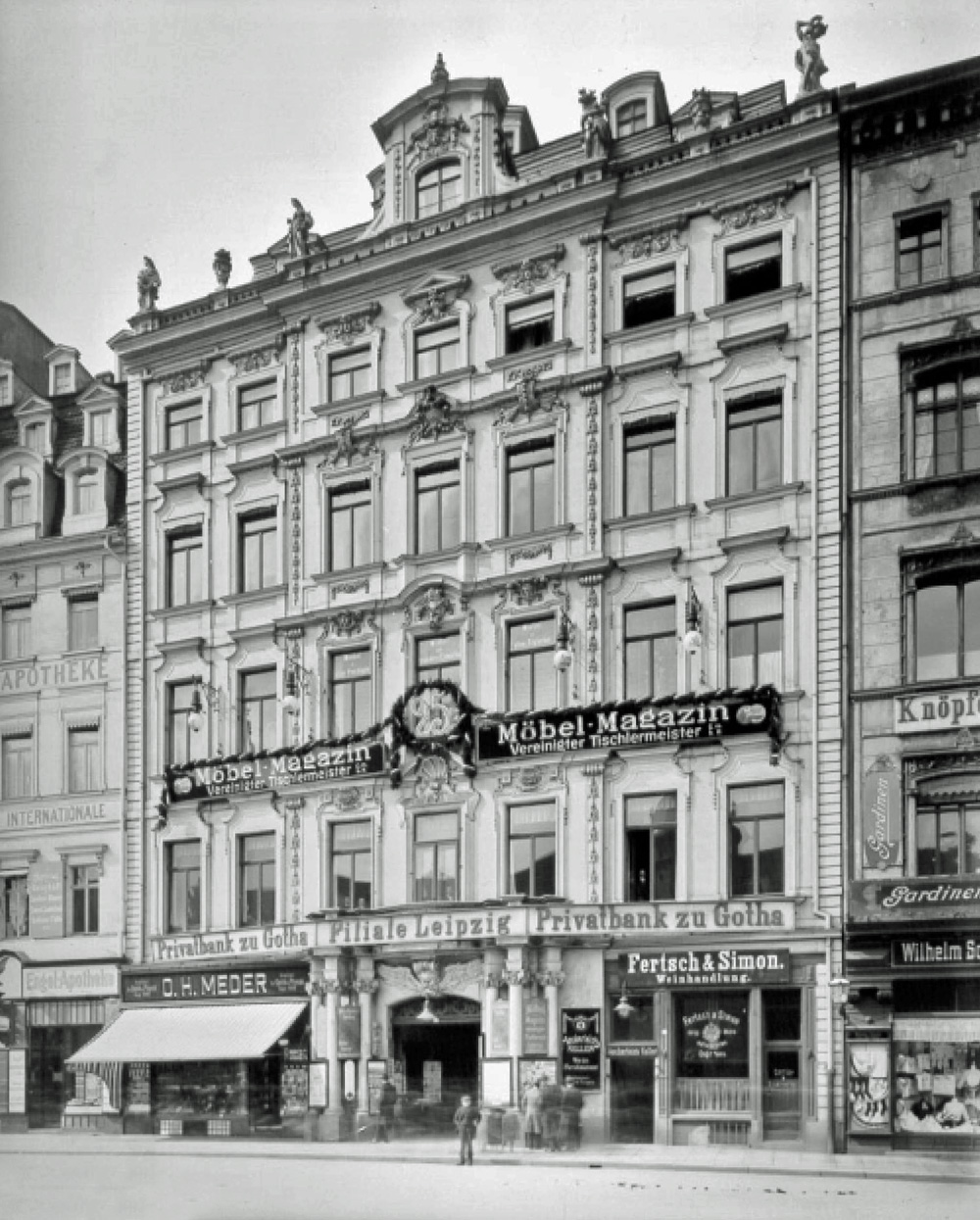 Der 1943 zerstörte Aeckerleins Hof (Markt 11) in Leipzig, 1903